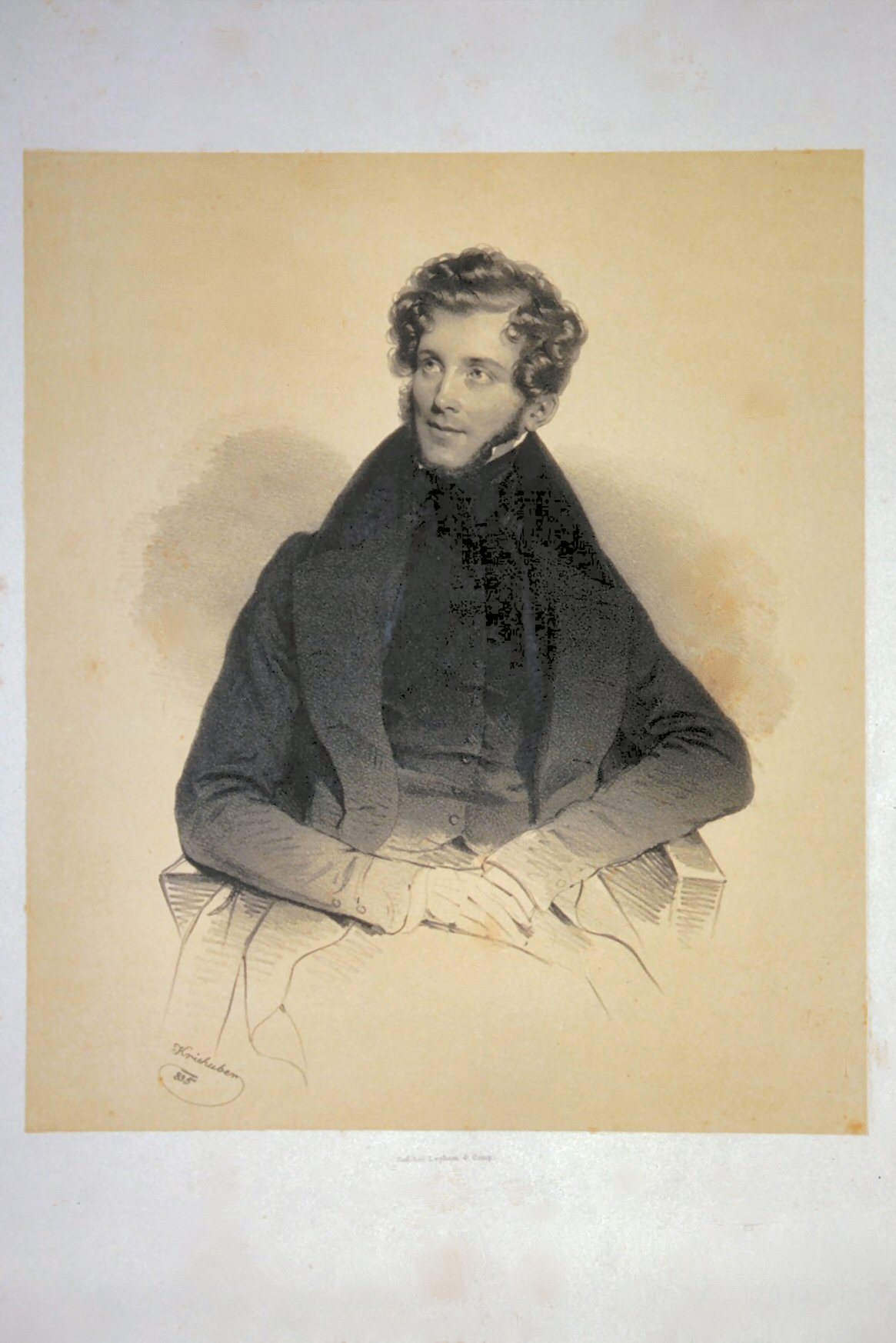 Karl Freiherr von Bodenhausen, 1831-1848 Hannover'scher Gesandter in Wien. Lithographie von Josef Kriehuber, 1835